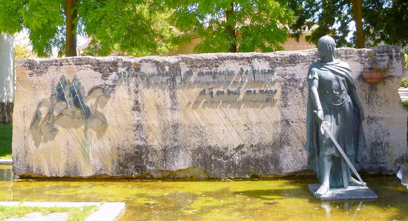 Solar del Cid (Vivar del Cid)